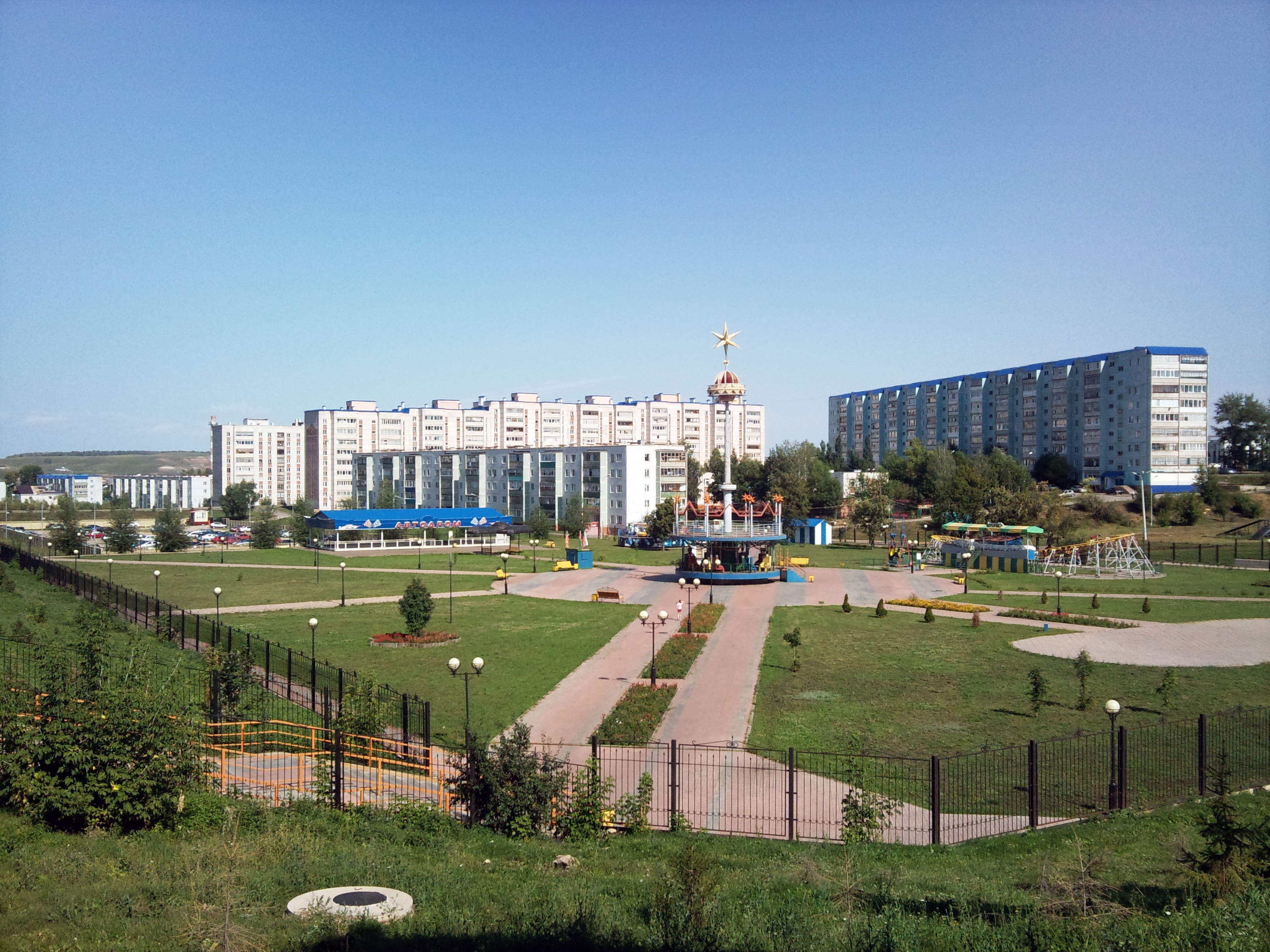 Парк Юбилейный в городе Лениногорск